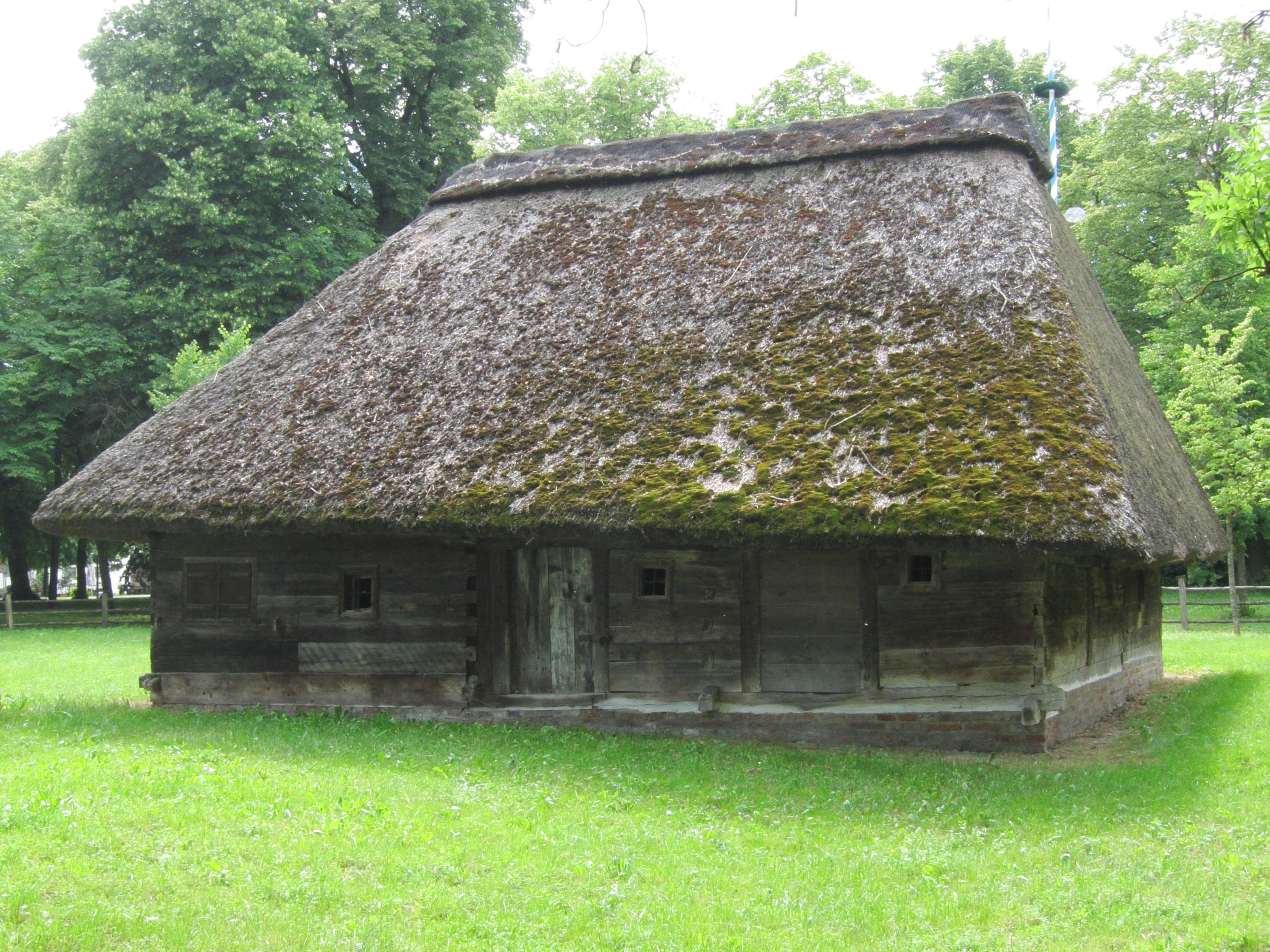 Bergham; Hirtenhaus, sog. Herderhäusl, sehr bemerkenswertes Beispiel eines erdgeschossigen Blockbaus mit strohgedecktem Walmdach, Mitte 17. Jahrhundert, restauriert.